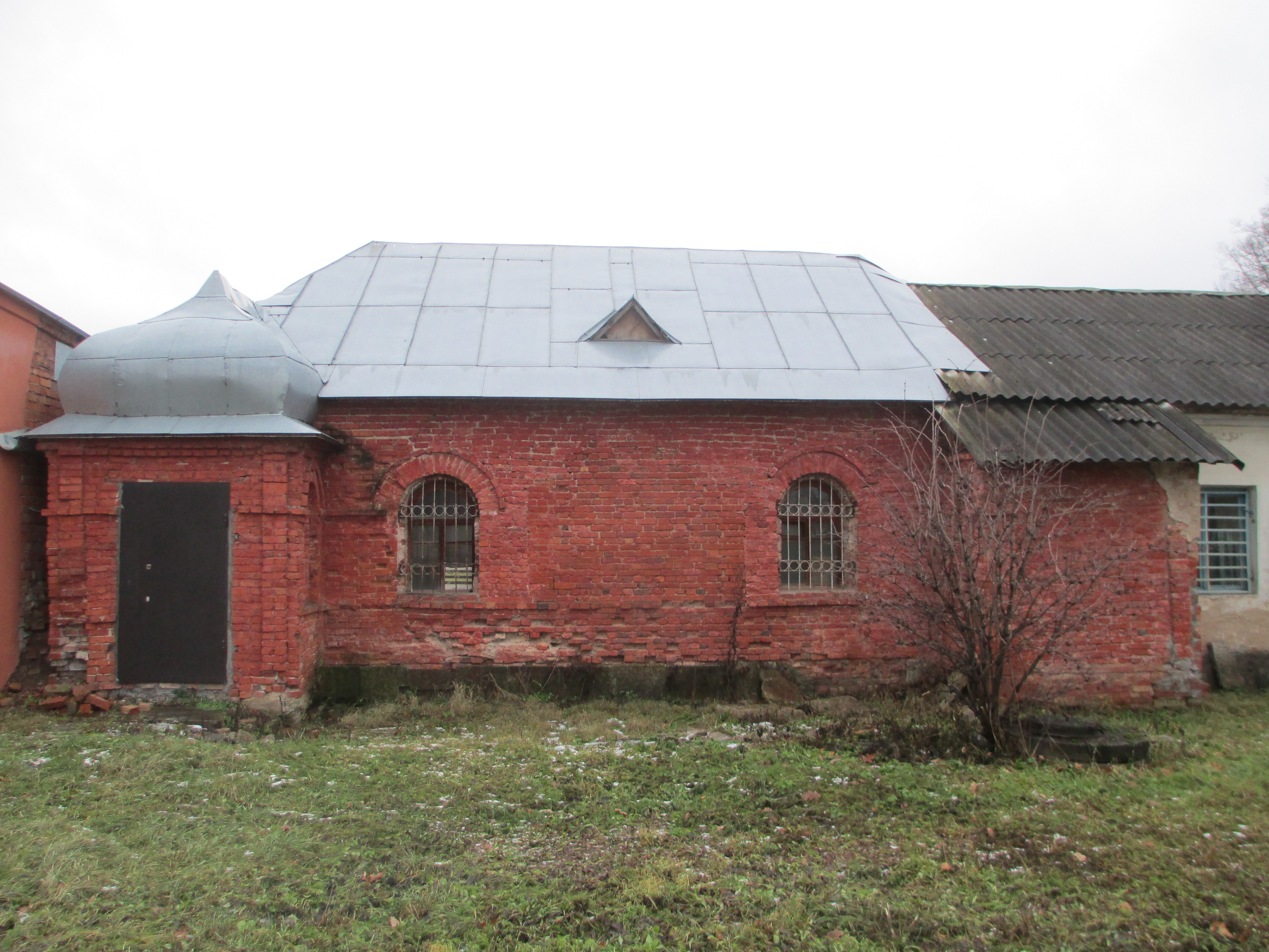 The western wall with functional rooms (the northern part) from the inner side